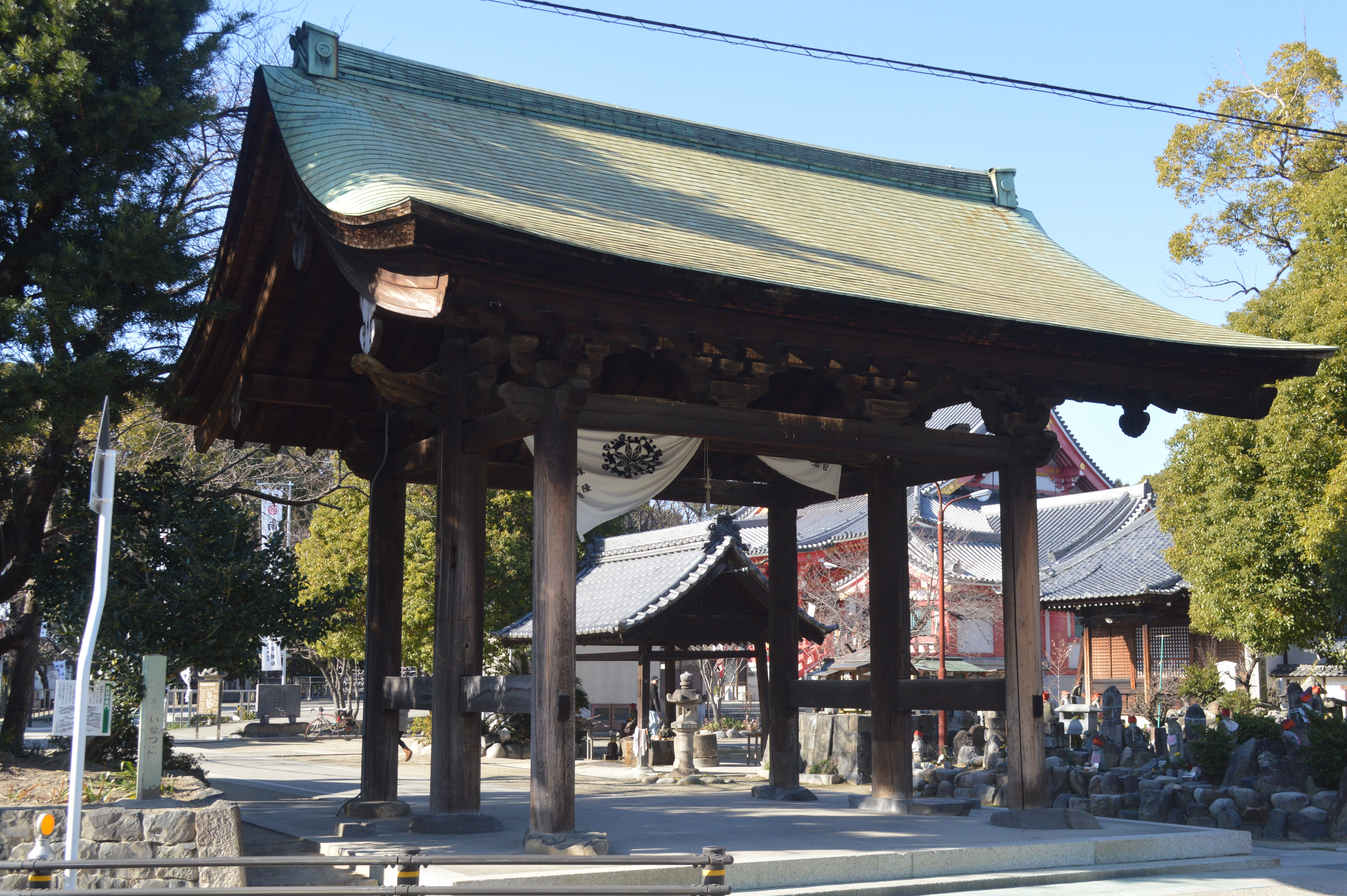 愛知県あま市にある甚目寺。東門。重要文化財。